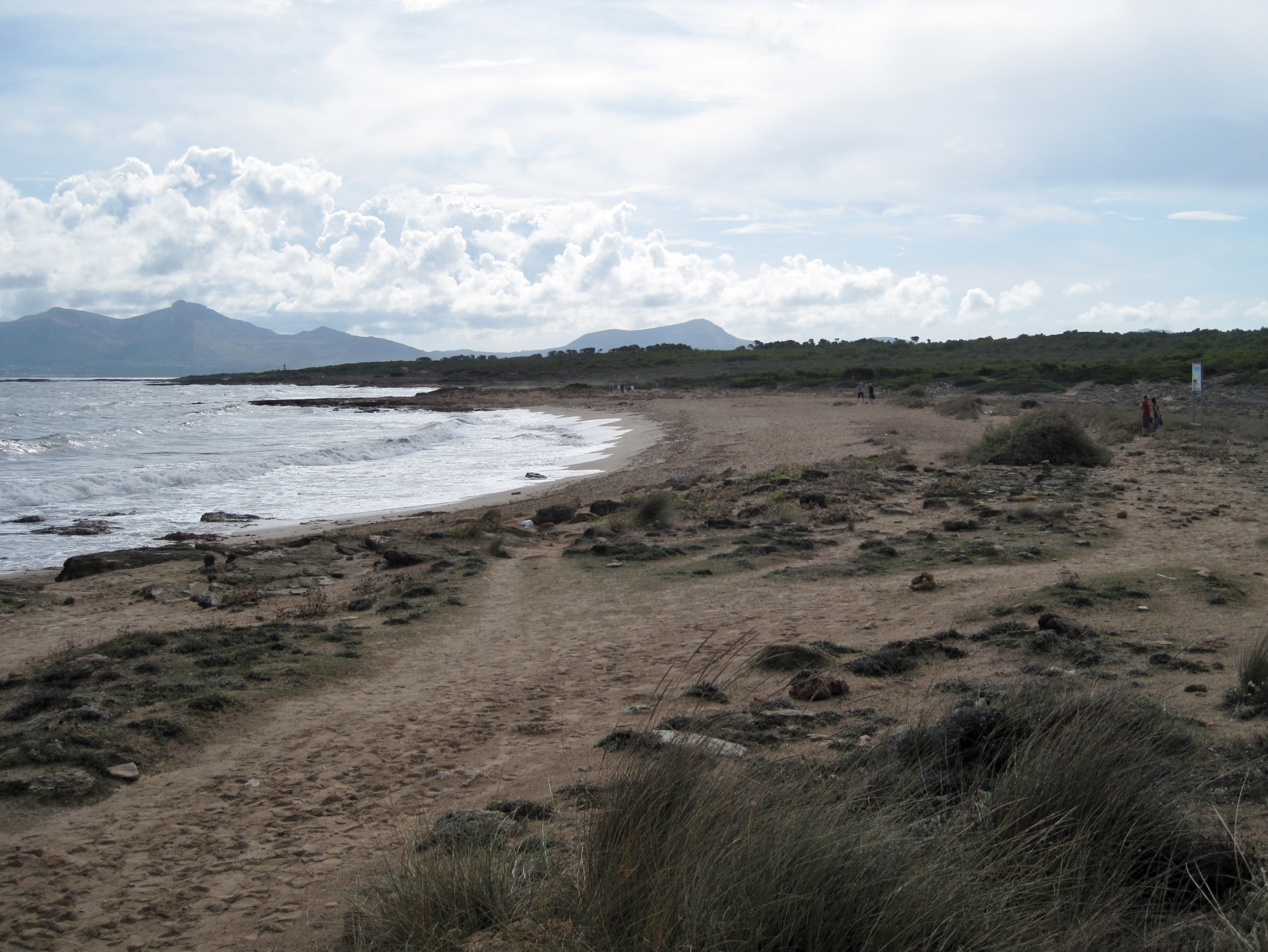 Strand von Na Patana an der Küste der Gemeinde Santa Margalida, Mallorca, Spanien